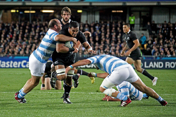 COUPE DU MONDE DE RUGBY 2011 NOUVELLE ZELANDE ARGENTINE